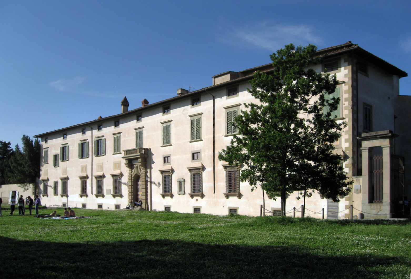 Exterior of the Villa di Castello in Florence.